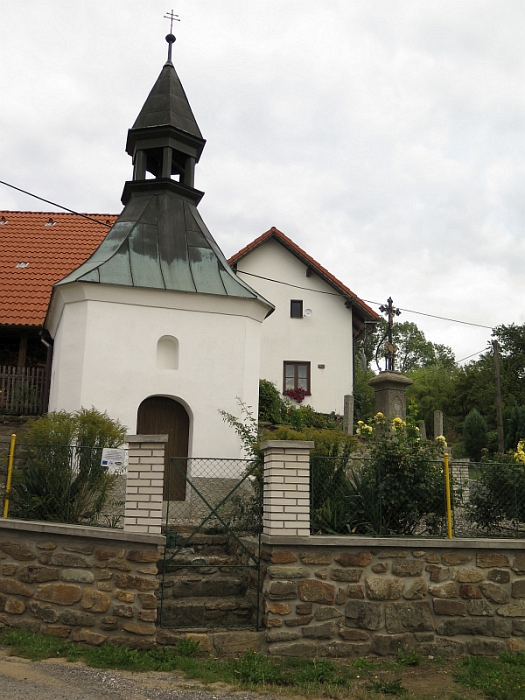 Kaplička s pamětním křížem, náves, Kroměždice.